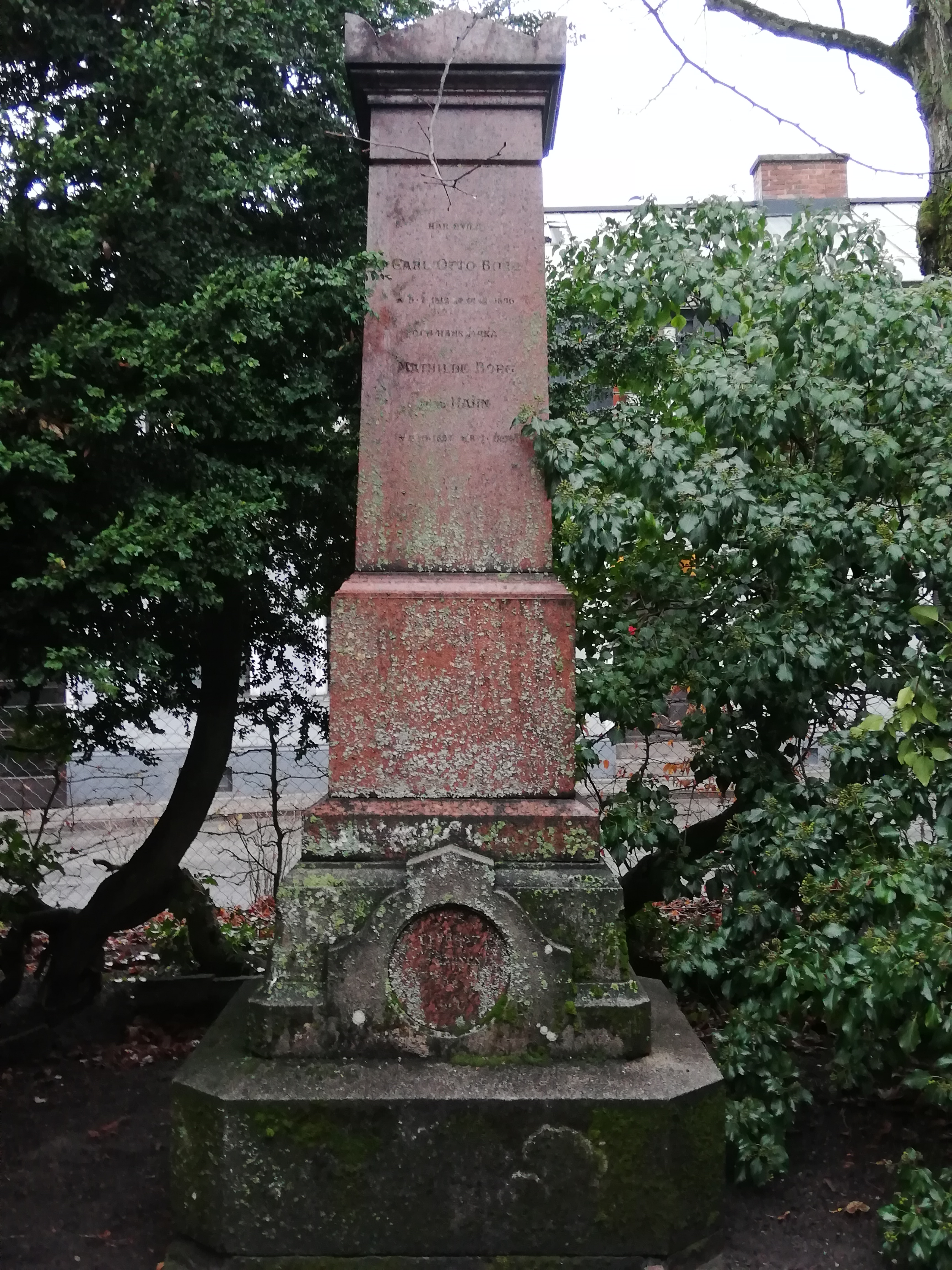 Färgfabrikör Carl Otto Borgs (1812-1896) grav på Östra kyrkogården, Lund